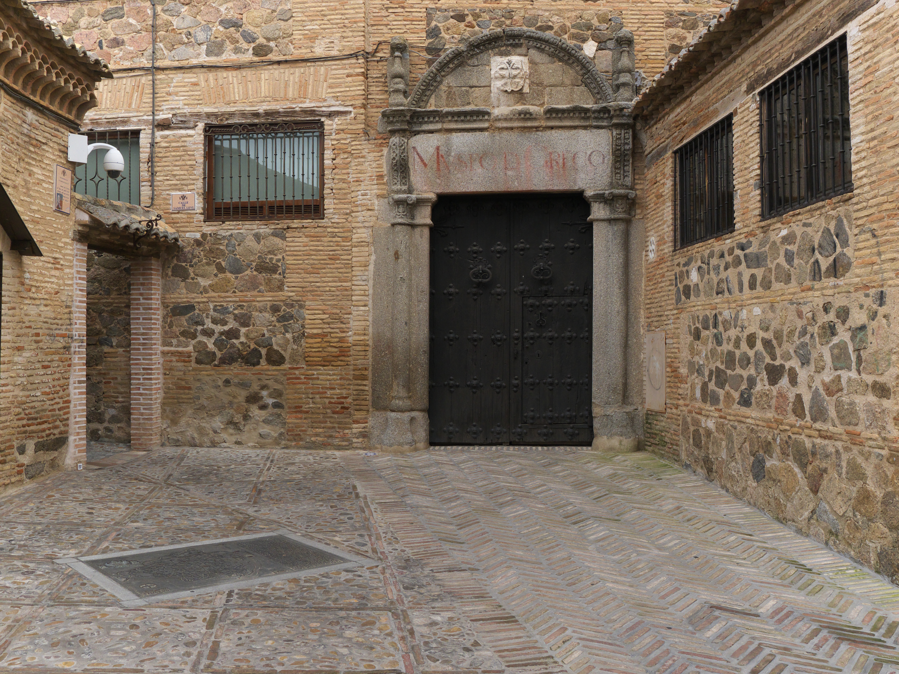 Una calle de la antigua judería.